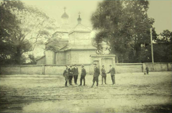 Беларуская (тарашкевіца): Новы Двор (Novy Dvor). Царква